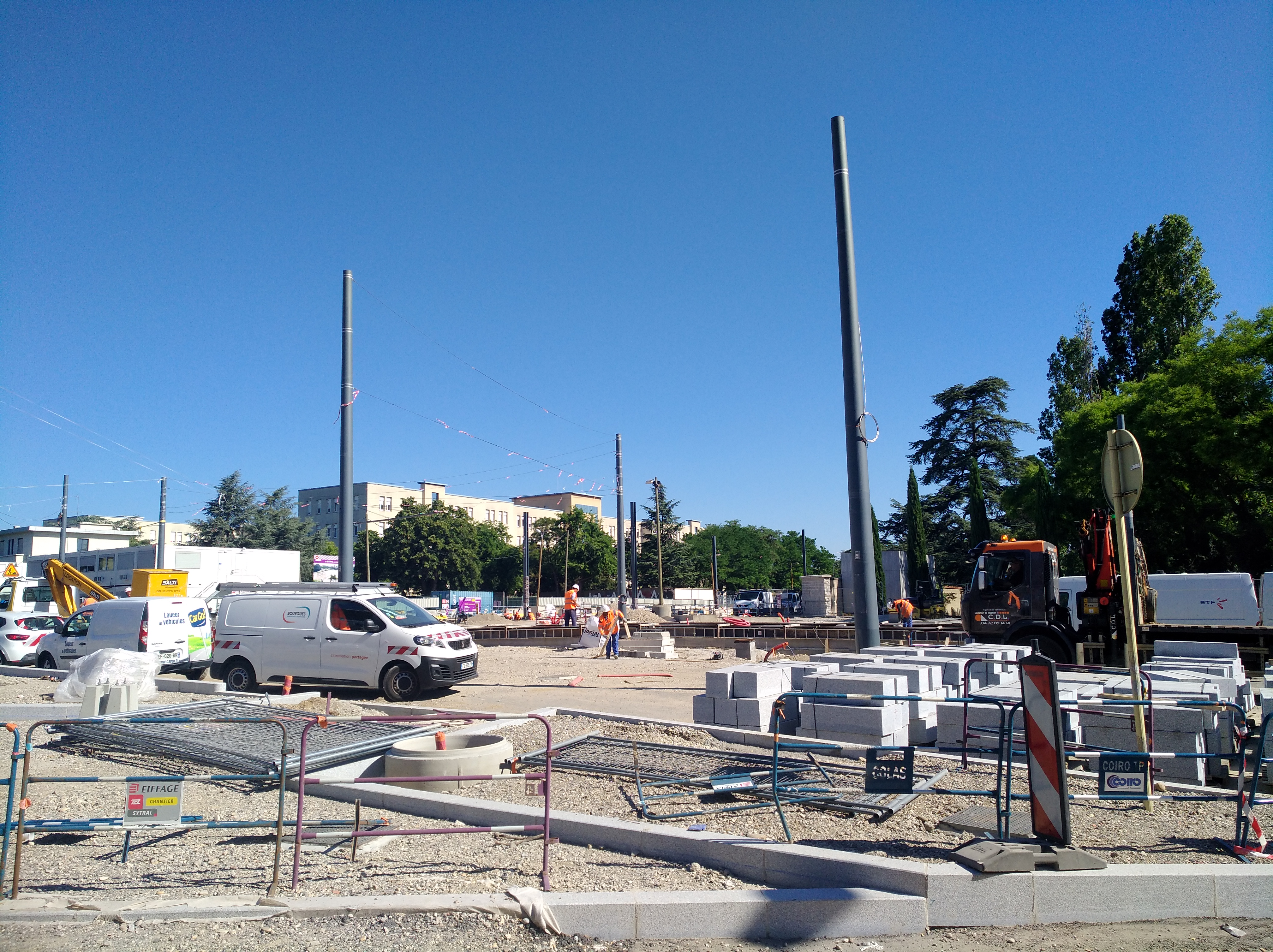 Travaux pour la nouvelle ligne de tramway T6 à Bron (Rhône, France).